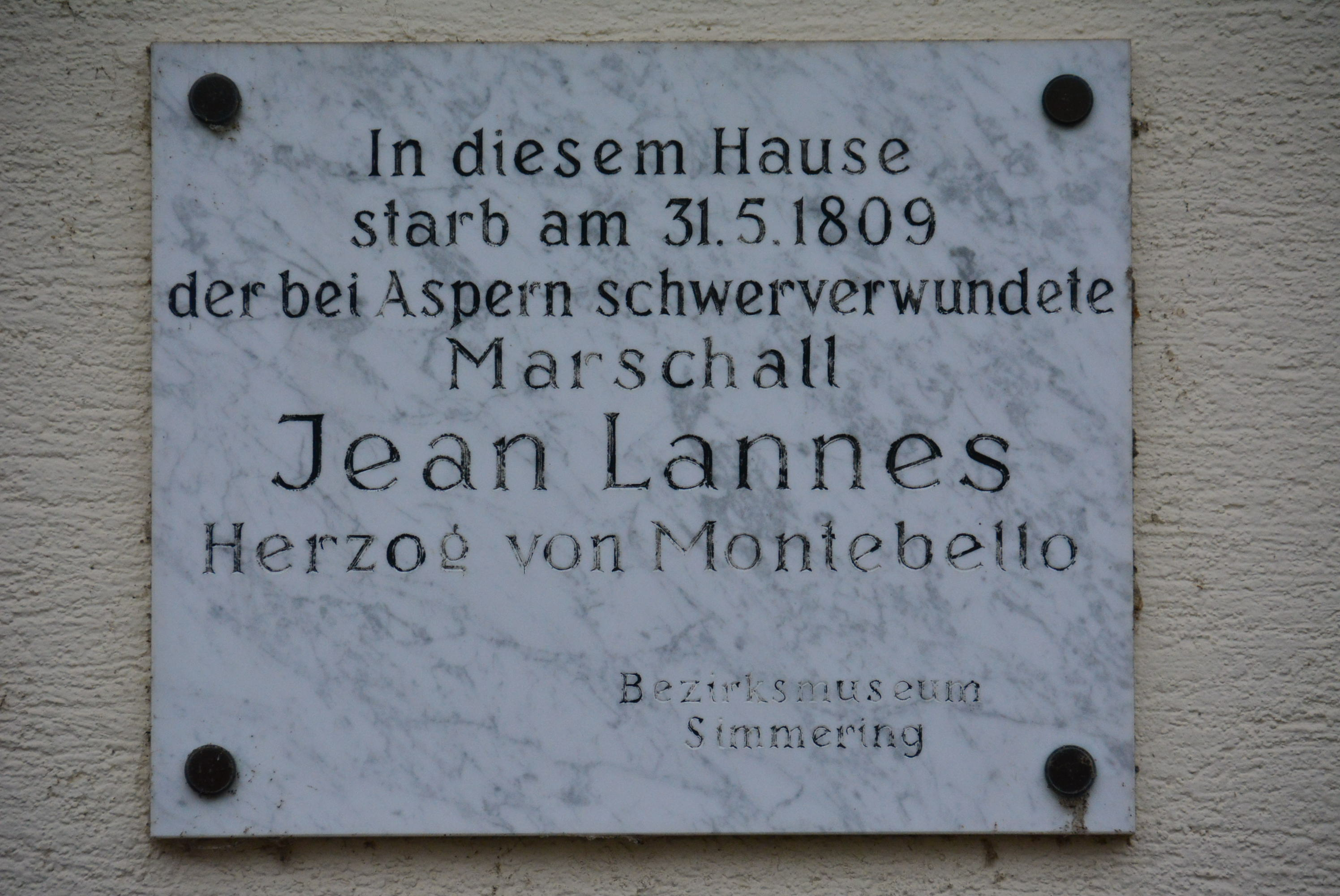 Gedenktafel für Jean Lannes (1769-1809)(Wien, Mailergasse 12)